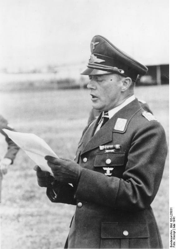 Kampf im Mittelmeer: Der kommandierende General des in Italien eingesetzten deutschen Fliegerkorpfs, General der Flieger Geisler, verleiht Männern seiner fliegenden Verbände für tapfere Leistungen das Eiserne Kreuz. PK-Krempl-Scherl Bilderdienst, Mai 1941 5474-41